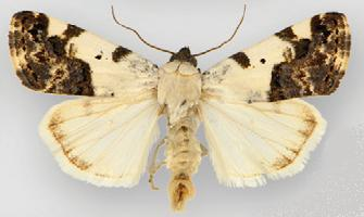 Tarache aprica male